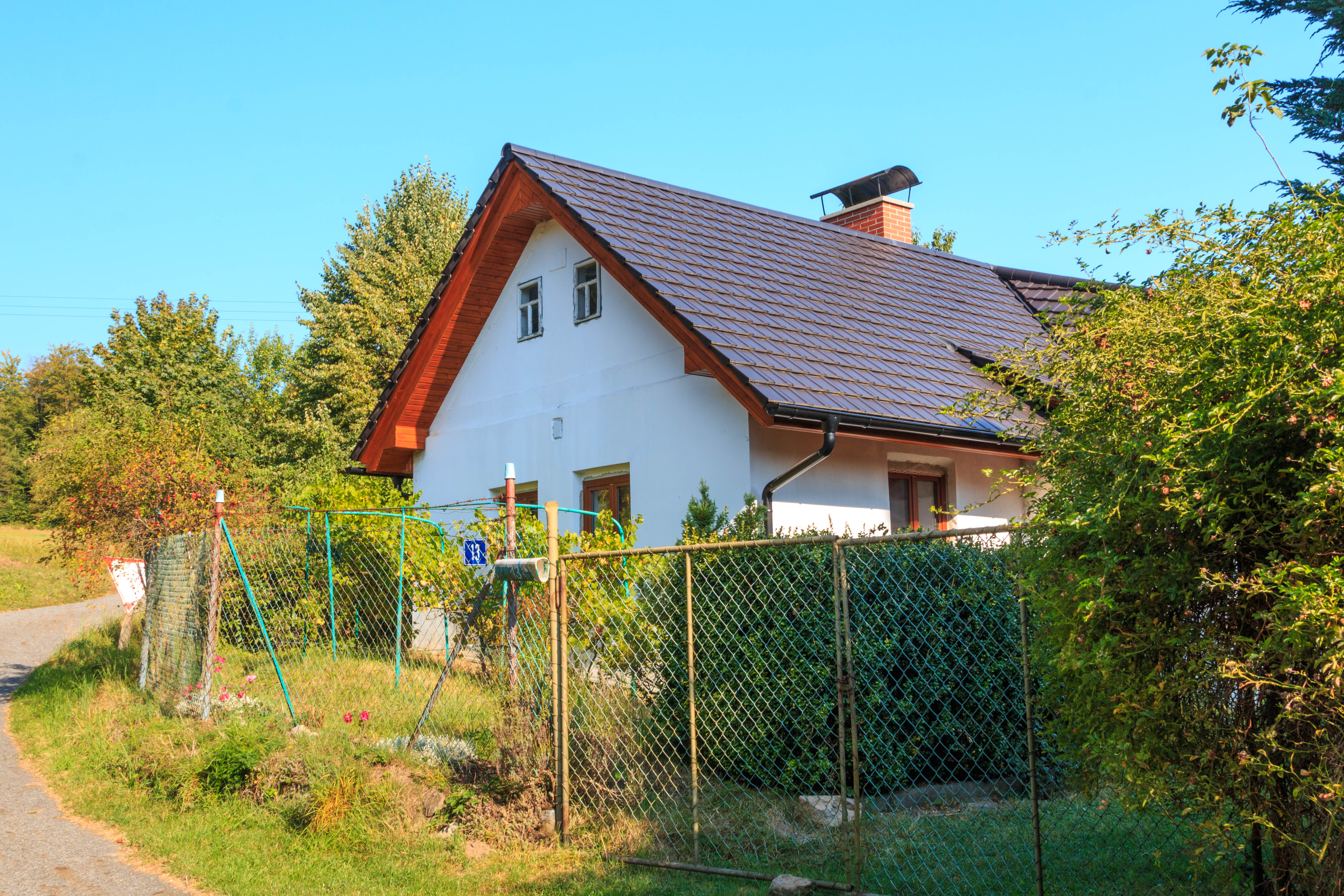 Záběhlice u Řečice - čp. 13